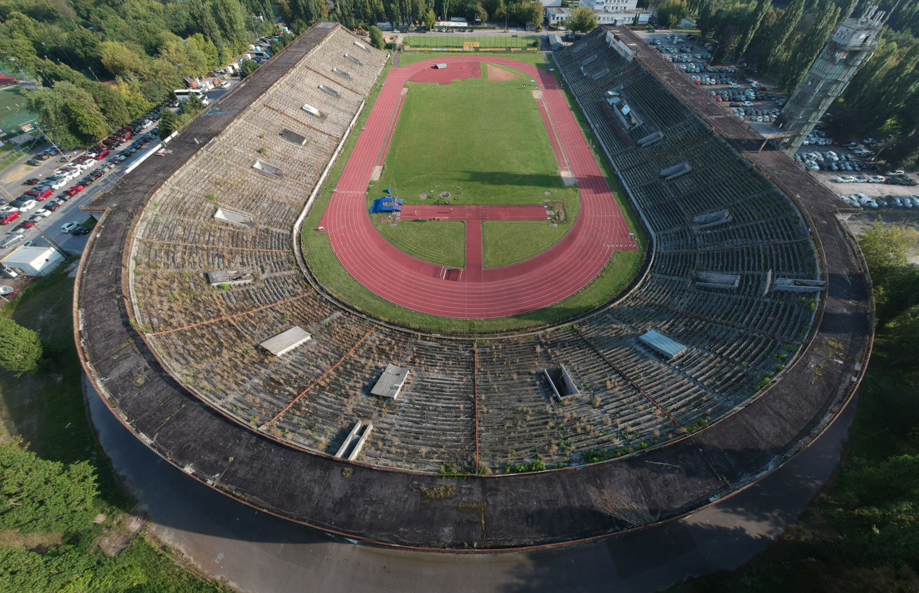 Stadion lekkoatletyczny SKRA Warszawa